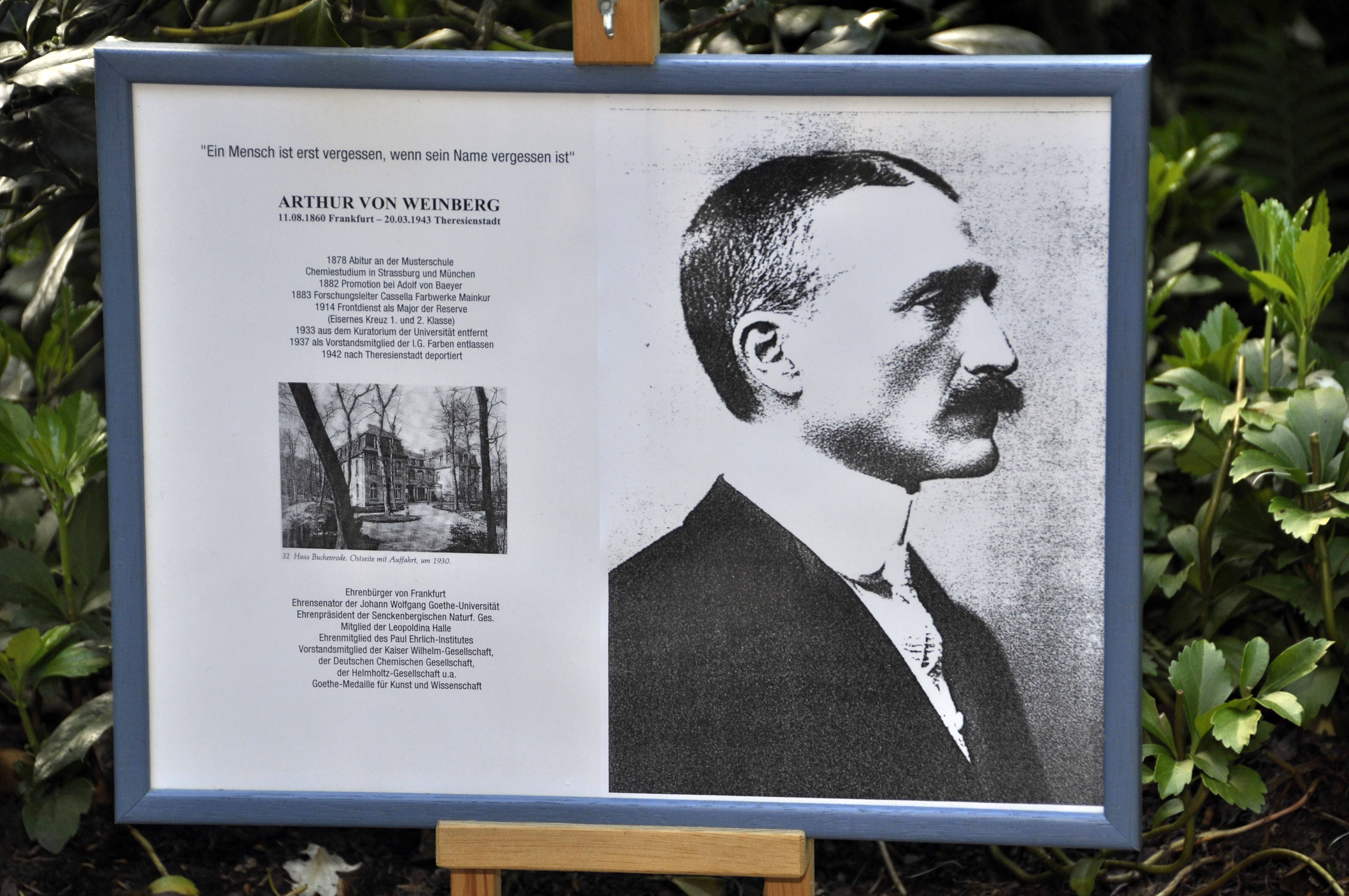 Stolpersteine Buchenrodestr Arthur von Weinberg Gedenktafel